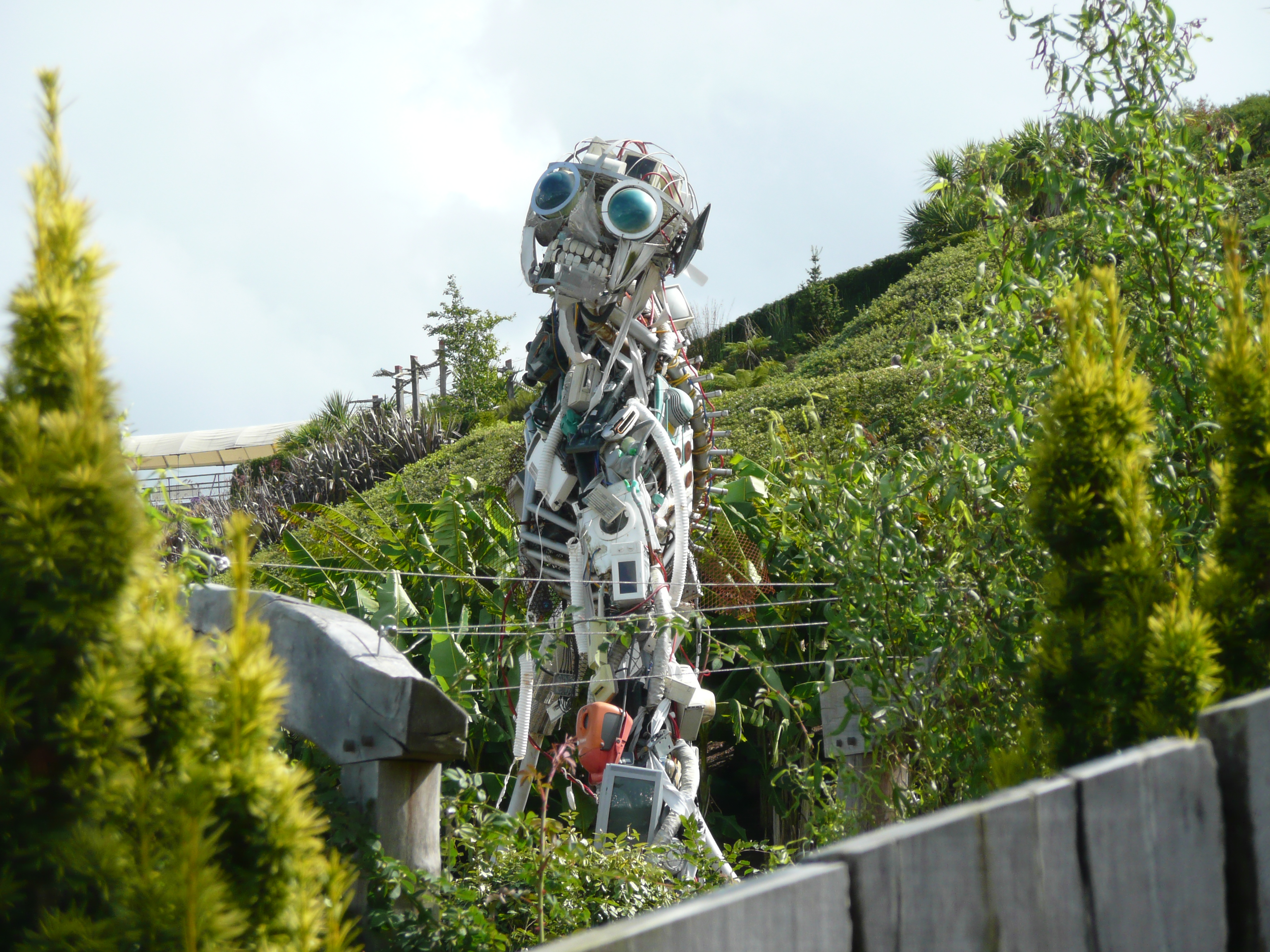 Recycling Figur im Eden Project in Cornwall